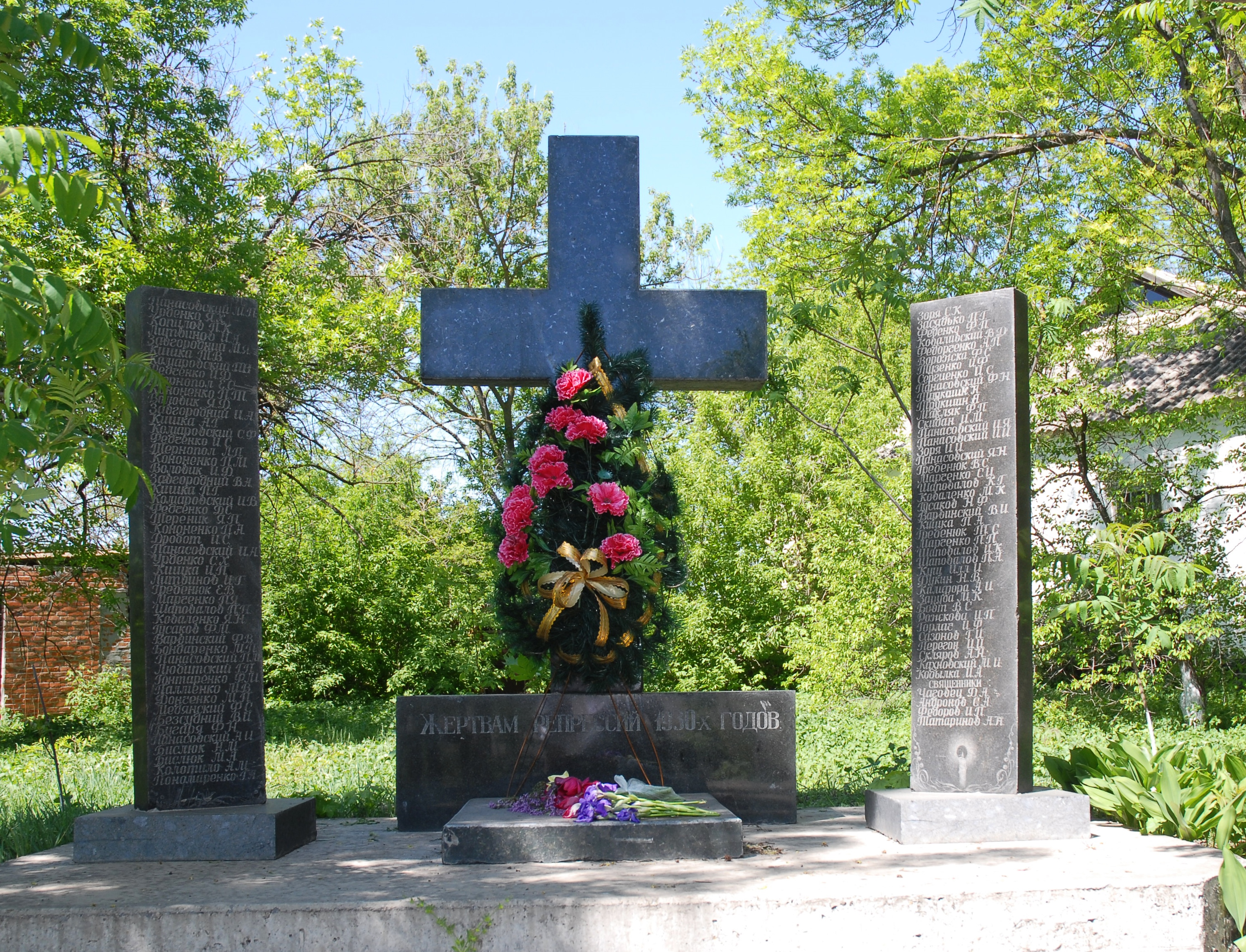 Пам'ятний знак жертвам політичних репресій. Встановлений у травні 2002 року з ініціативи Трохименко Оксани Ілларіонівни, голови ГО "Справедливість"